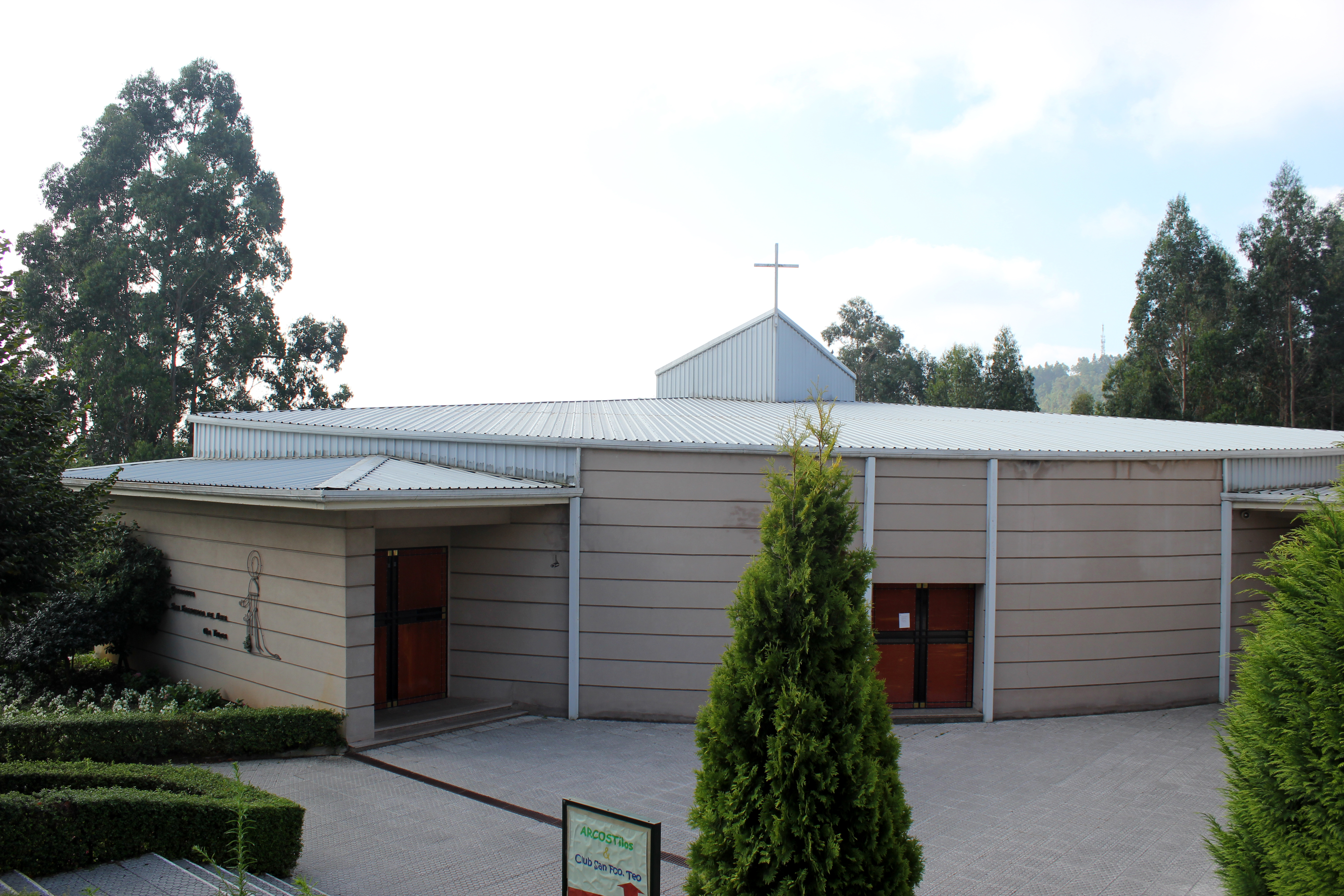 Igrexa dos Tilos, Teo.